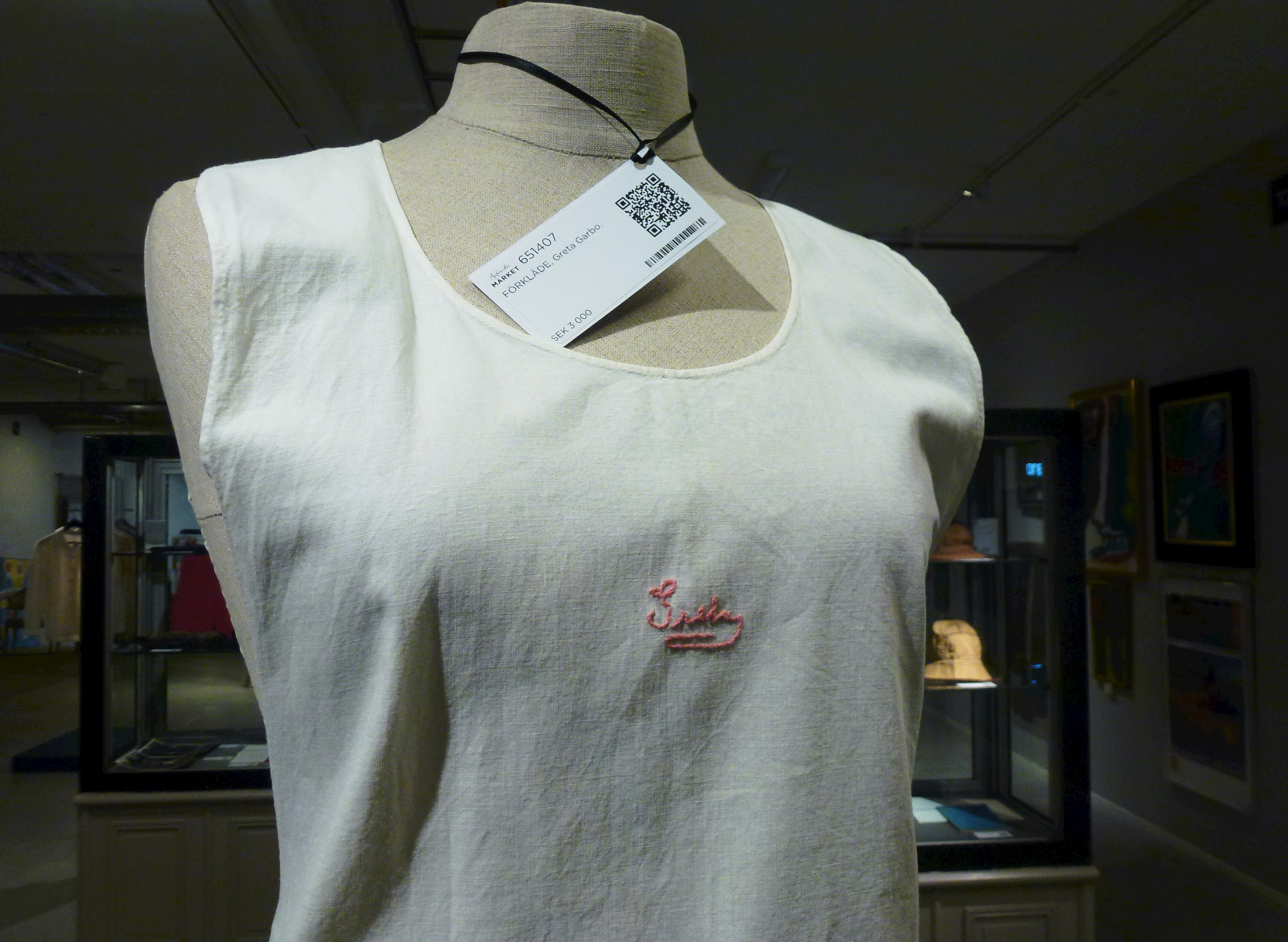 Greta Garbos förkläde på Bukowskis auktion 2015